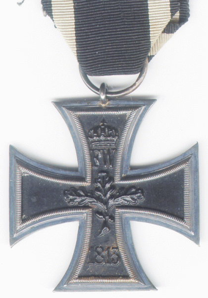 Eisernes Kreuz 2.Klasse Rückseite